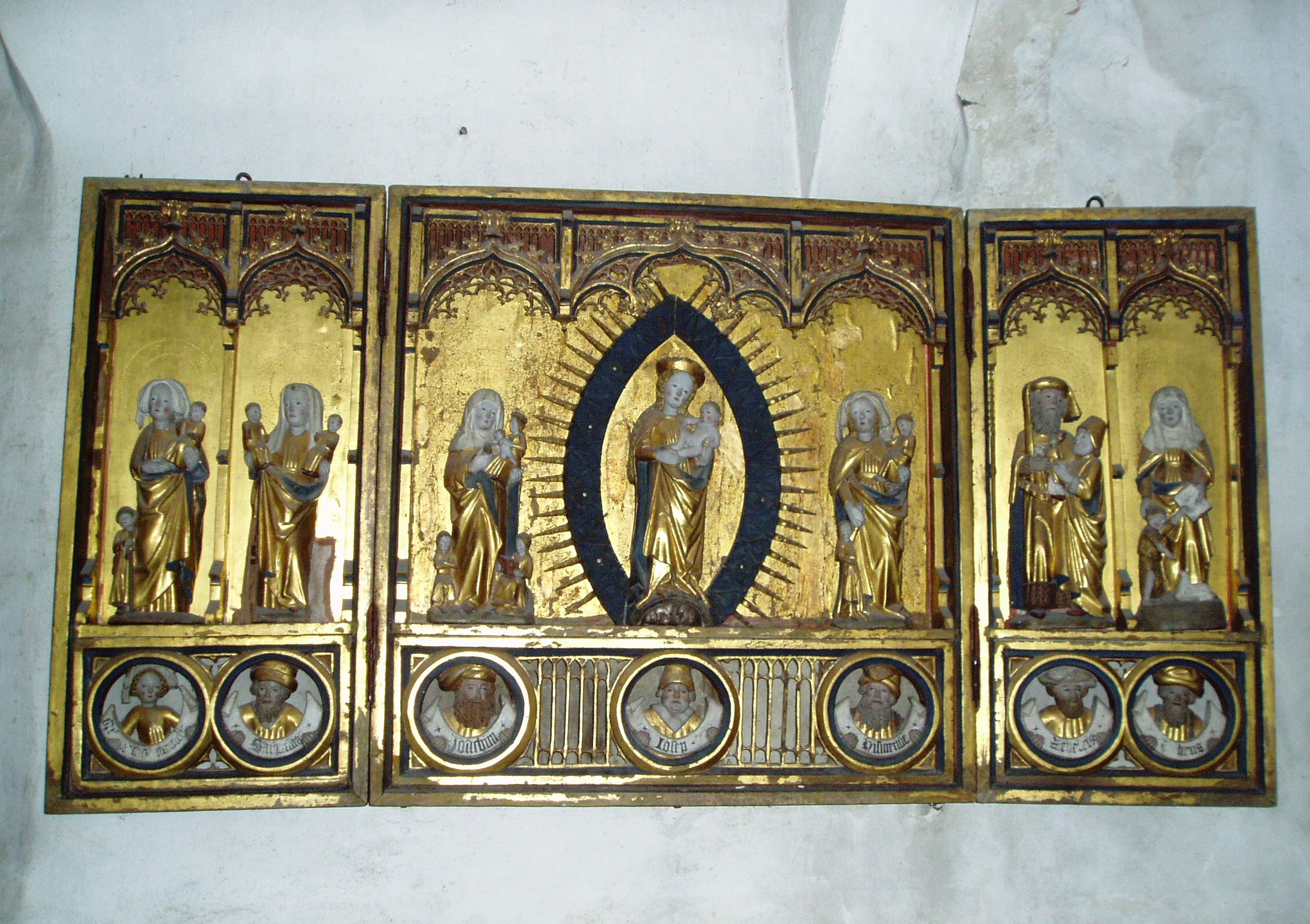 Altarskåp, Fresta kyrka, Uppland